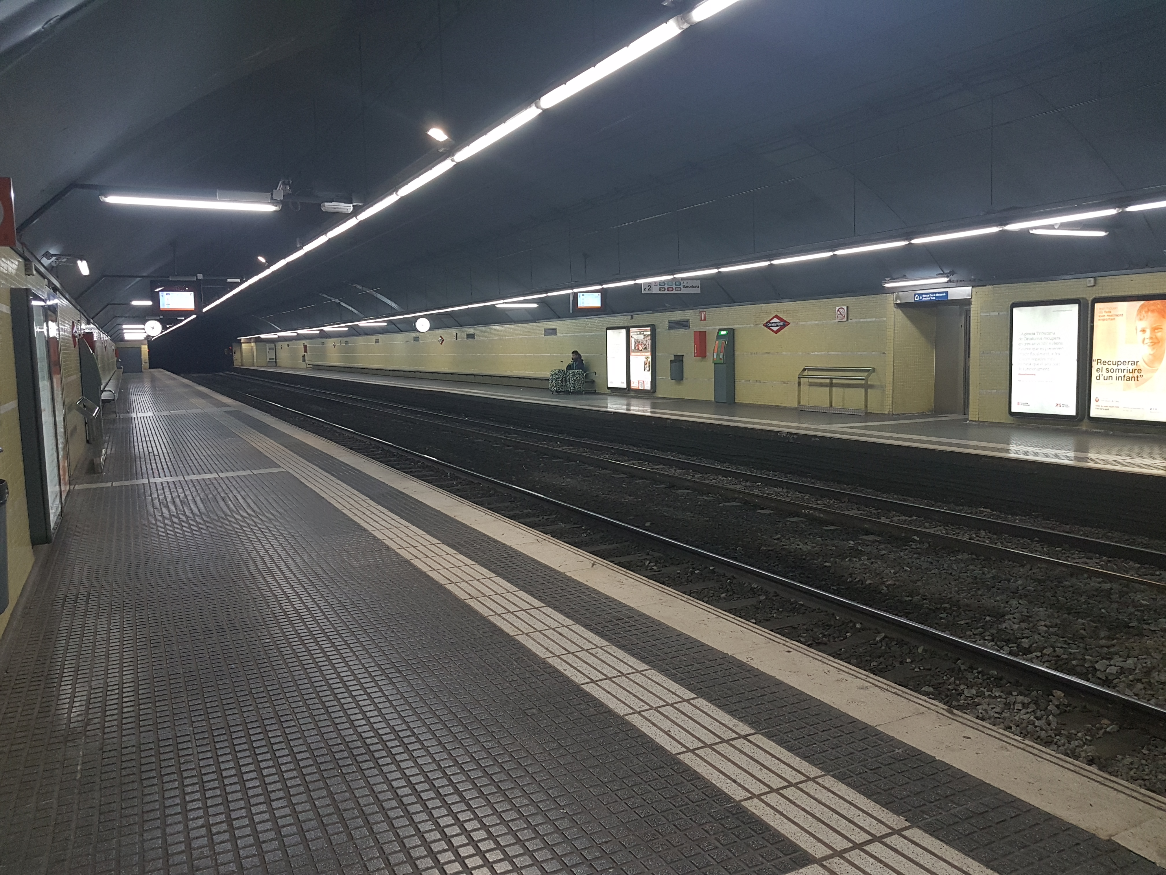 L'estació de Cornella-Riera en el tram entre Barcelona i Martorell de la línia Llobregat-Anoia